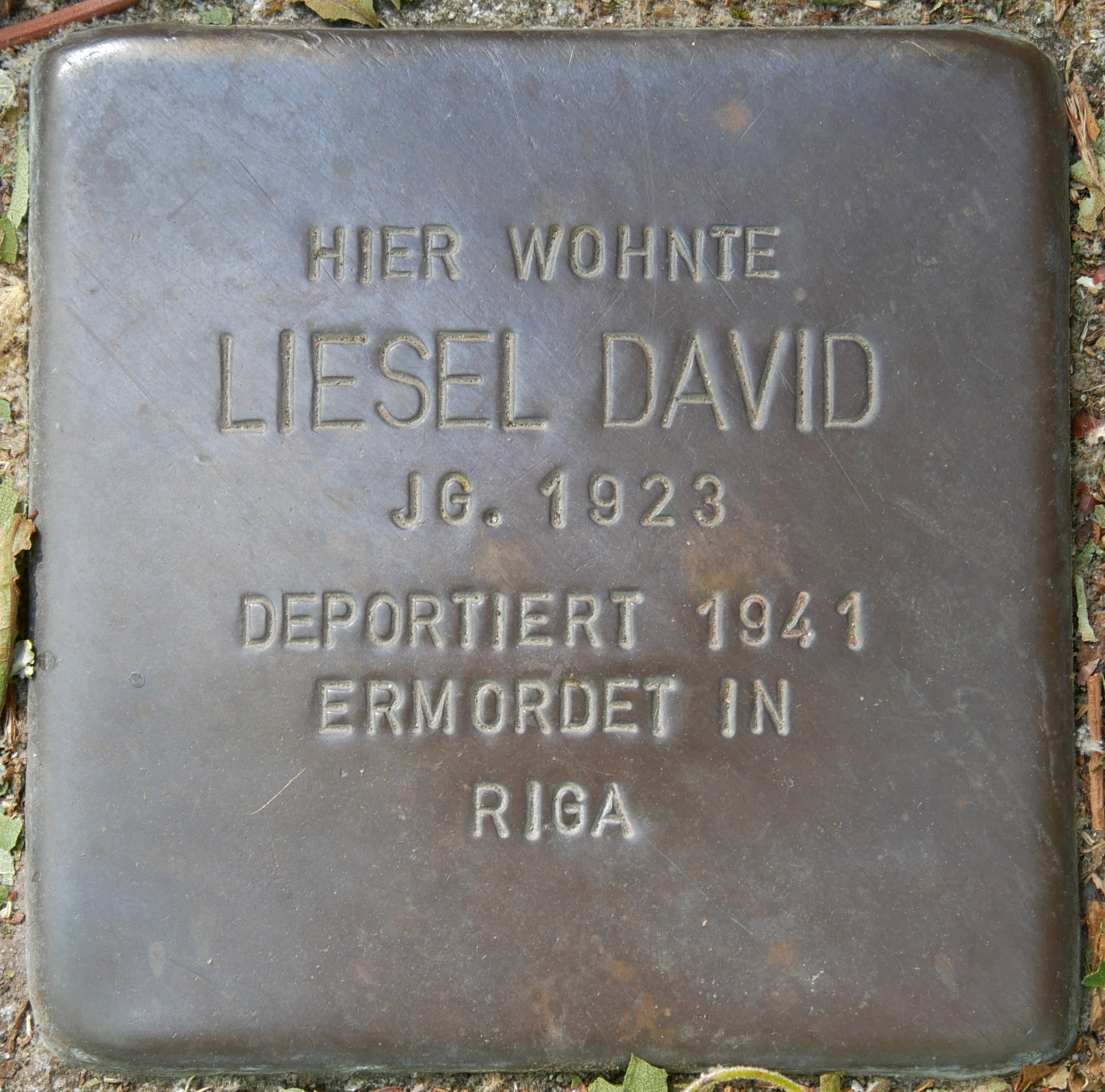 Stolpersteine Wesel: David, Liesel (2)